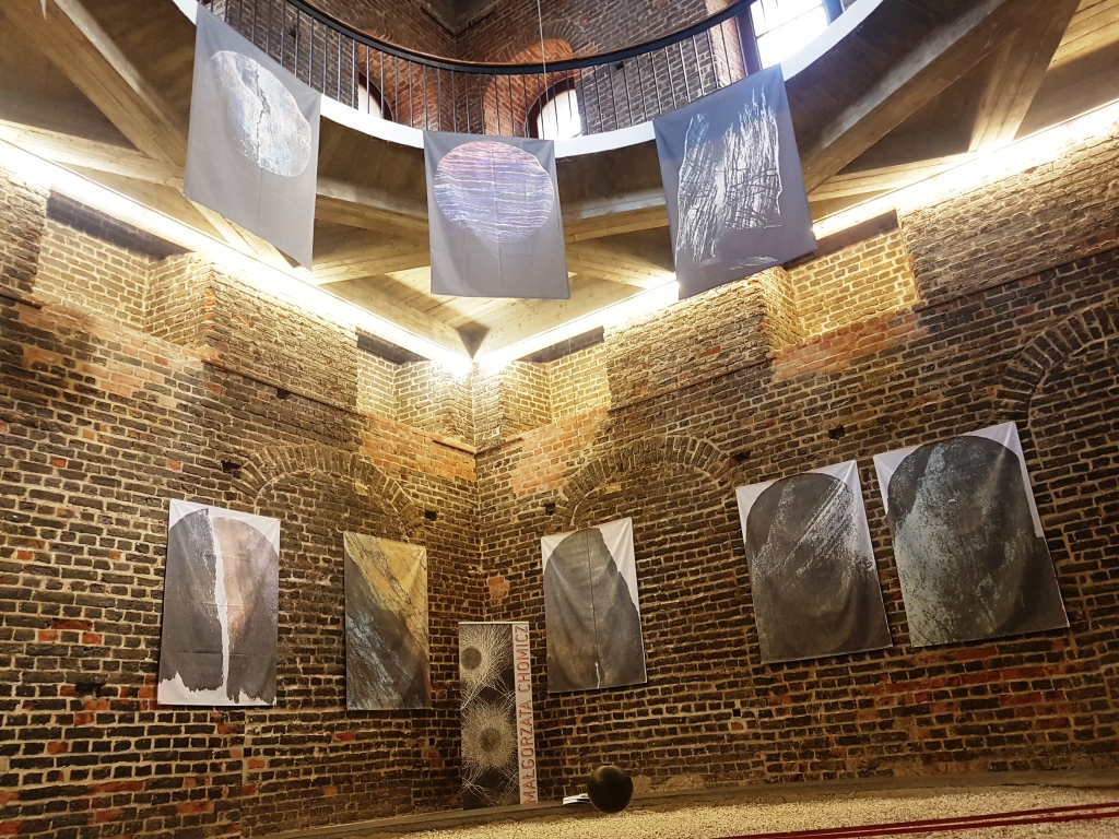 Małgorzata Chomicz wystawa 2018, wieża Radziejowska, wieża Radziejowskiego, wahadło Foucaulta